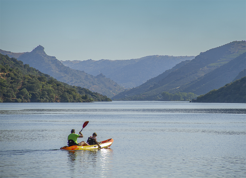 Vista del embalse de Saucelle desde Vilvestre, Castilla y Léon, España.